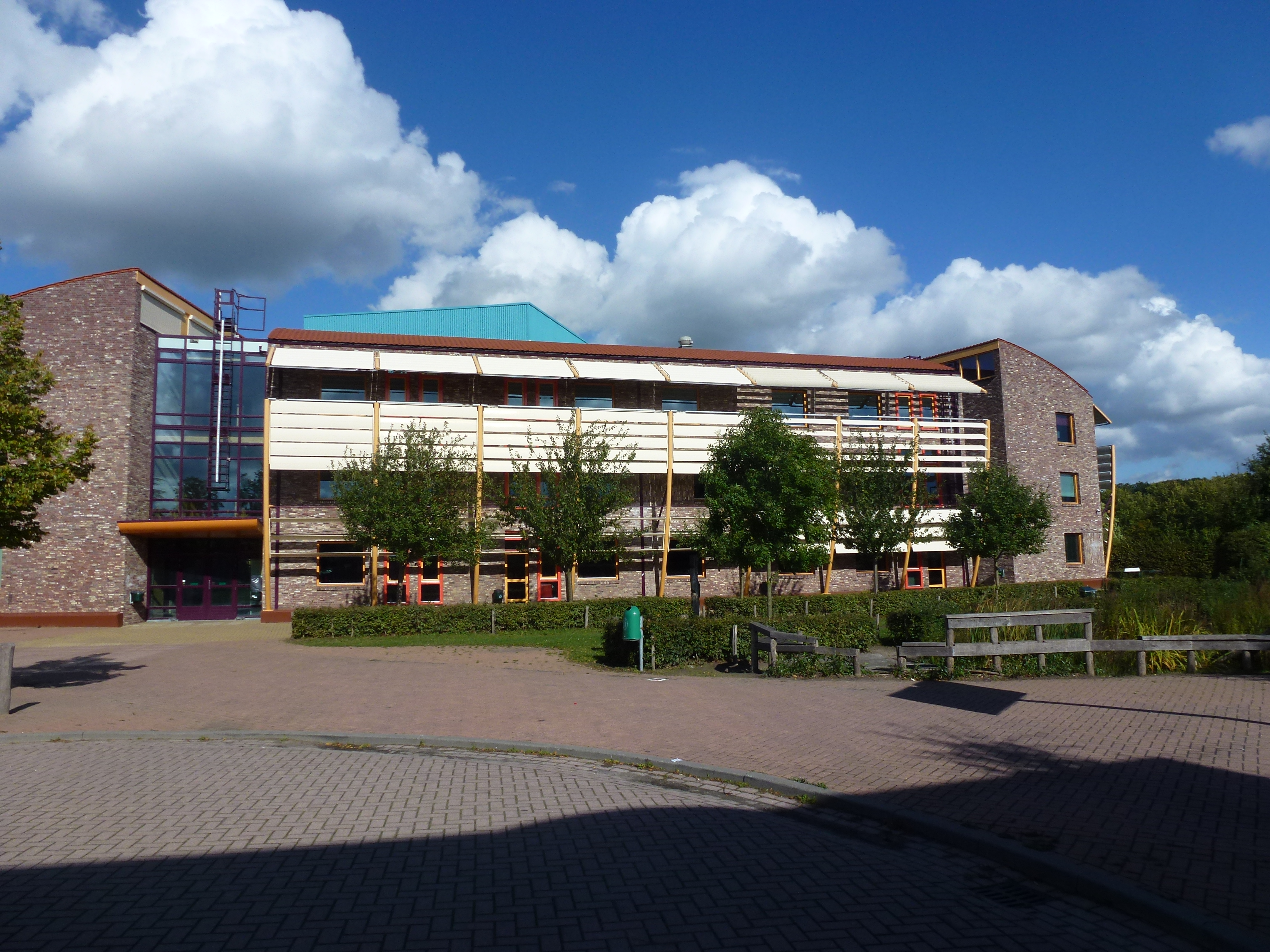 Novaliscollege Eindhoven